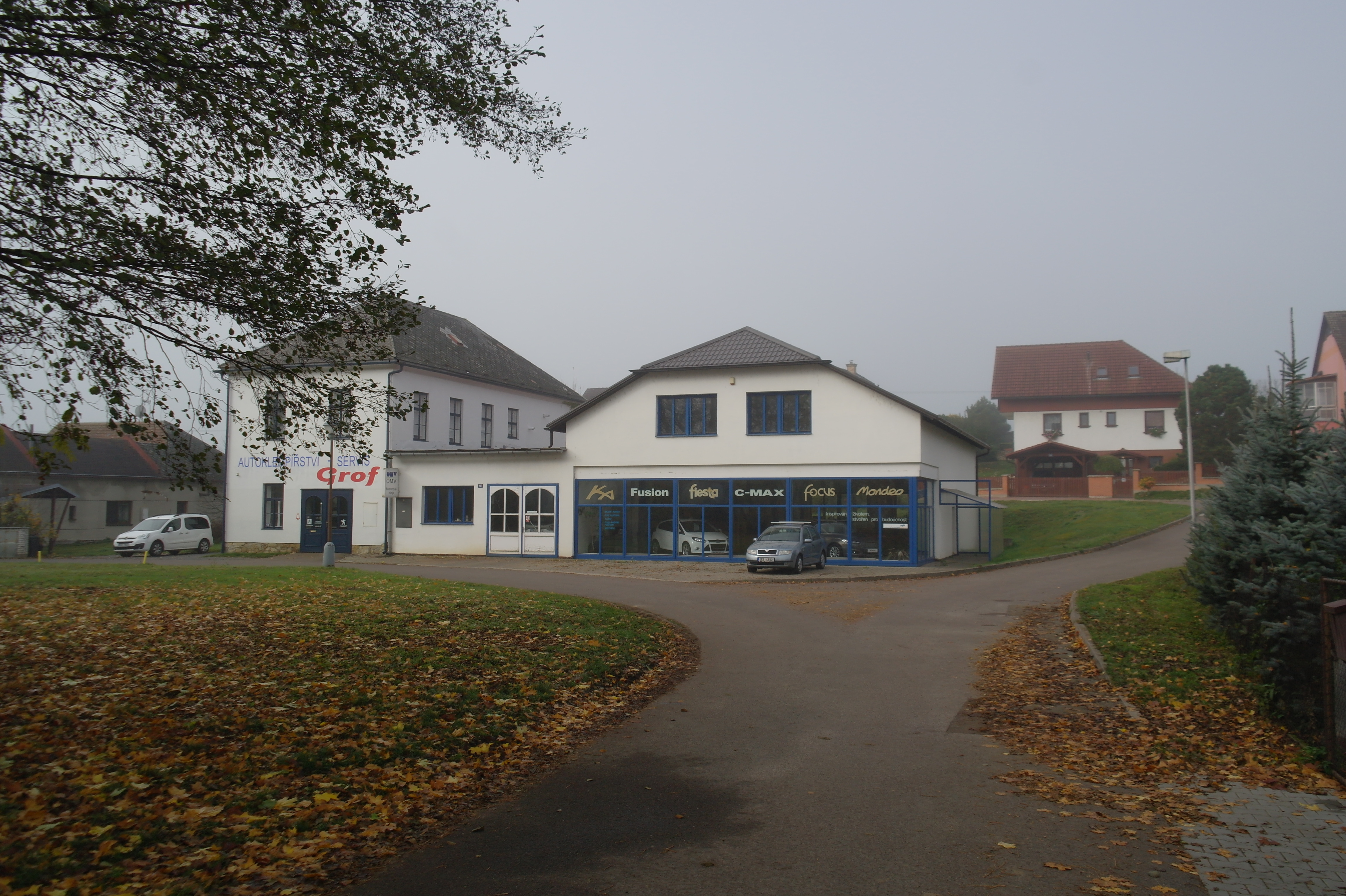 Sázava, domy čp. 56 a 157